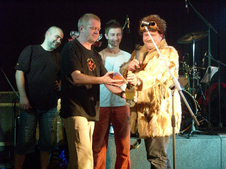 Mňága křtí nové CD "Na stanici polární" v Olomouci.